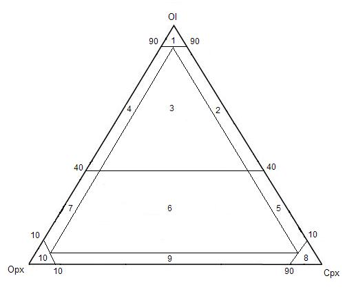 Trójkąt klasyfikacyjny o narożach OlOpxCpx, dla skał ultramaficznych. 1-4 perydotyty, 5-10 piroksenity.